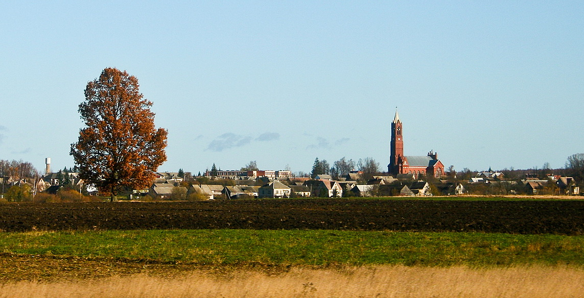 Sasnava, Lithuania